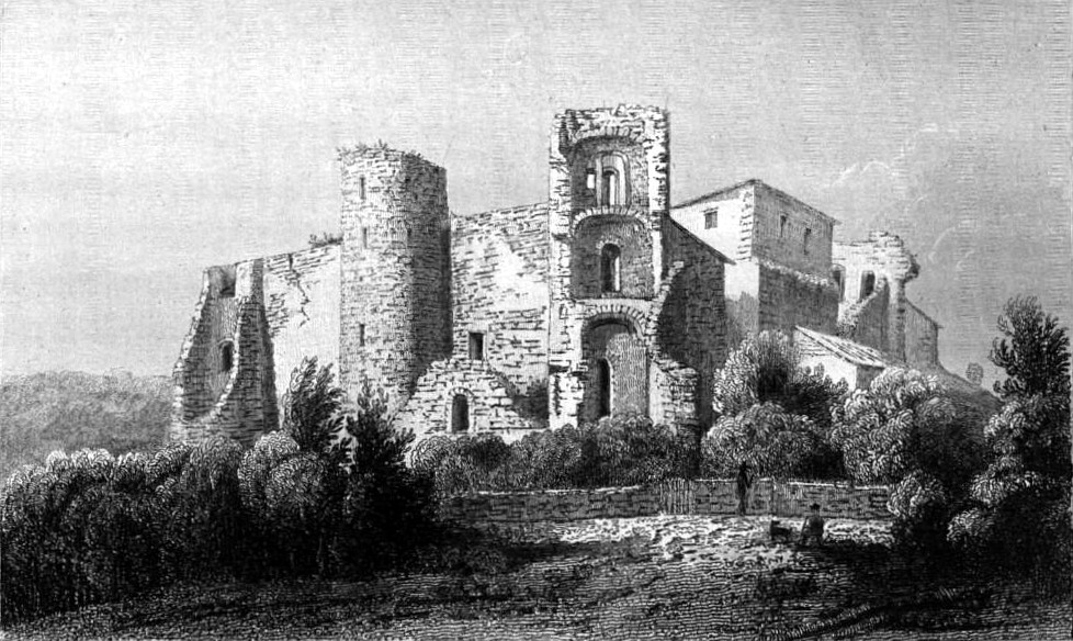 Image en provenance du livre : Eusèbe Girault de Saint-Fargeau, Guide pittoresque du voyageur en France, contenant la statistique et la description complète des quatre-vingt-six départements, orné de 740 vignettes et portraits gravés sur acier, de quatre-vingt-six cartes de départements et d'une grande carte routière de la France, par une Société de gens de lettres, de géographes et d'artistes, Paris, F. Didot frères, 1838, 6 volumes in-8° (BNF : 8-L25- 46). Volume III Didot frères, 1838. Route de Paris à Nice traversant les départements de l'Isère, des Hautes-Alpes, des Basses-Alpes et du Var. auteurs dessins : Rauch (ou autre) auteurs gravures : Skelton fils, Schroeder, Bishop (ou autre)